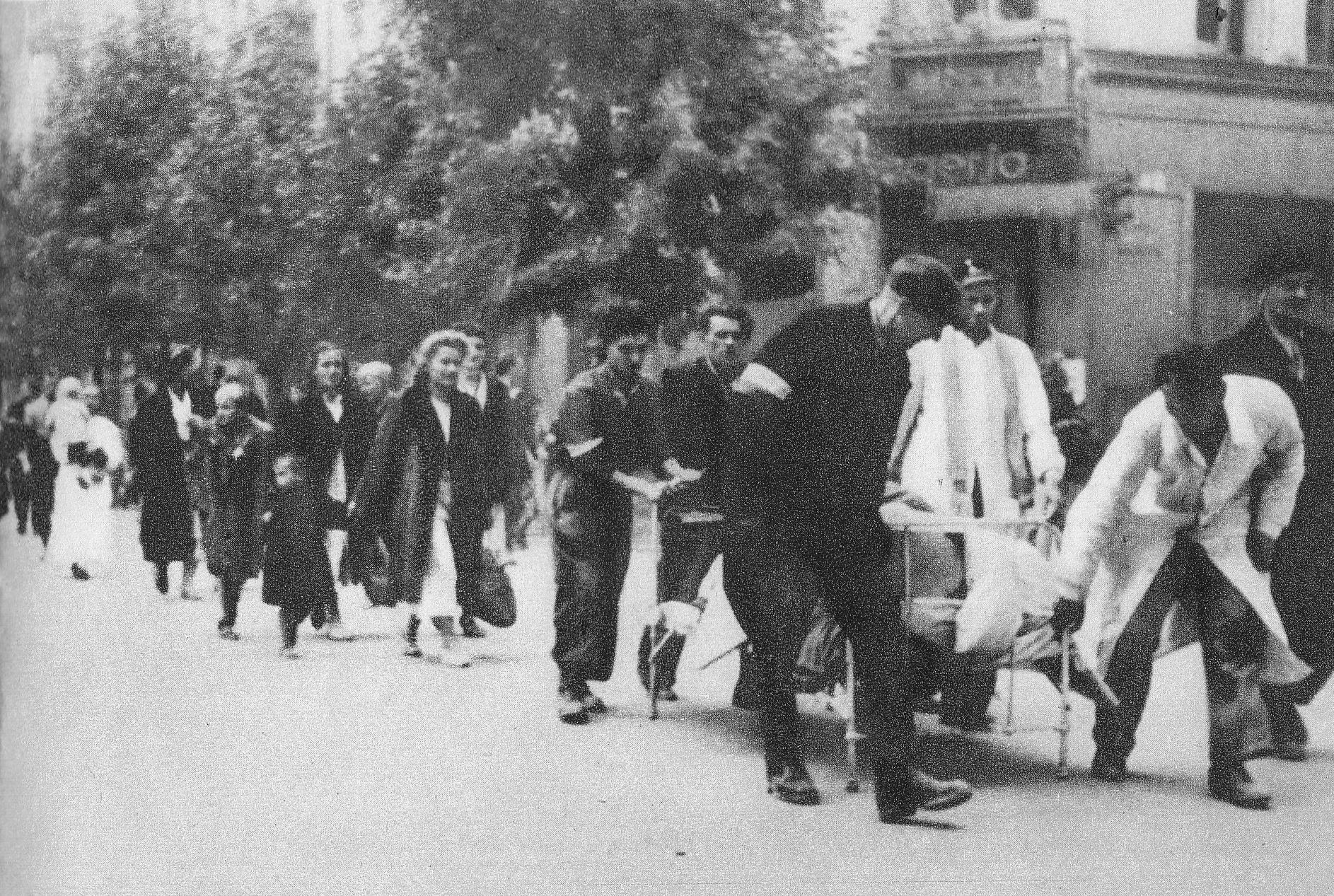 Powstanie warszawskie. Ewakuacja Szpitala Maltańskiego